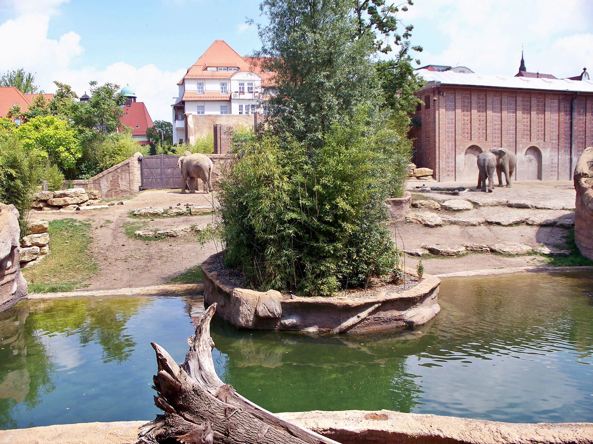 Die neue Außenanlage des Elefantentempels im Leipziger Zoo.